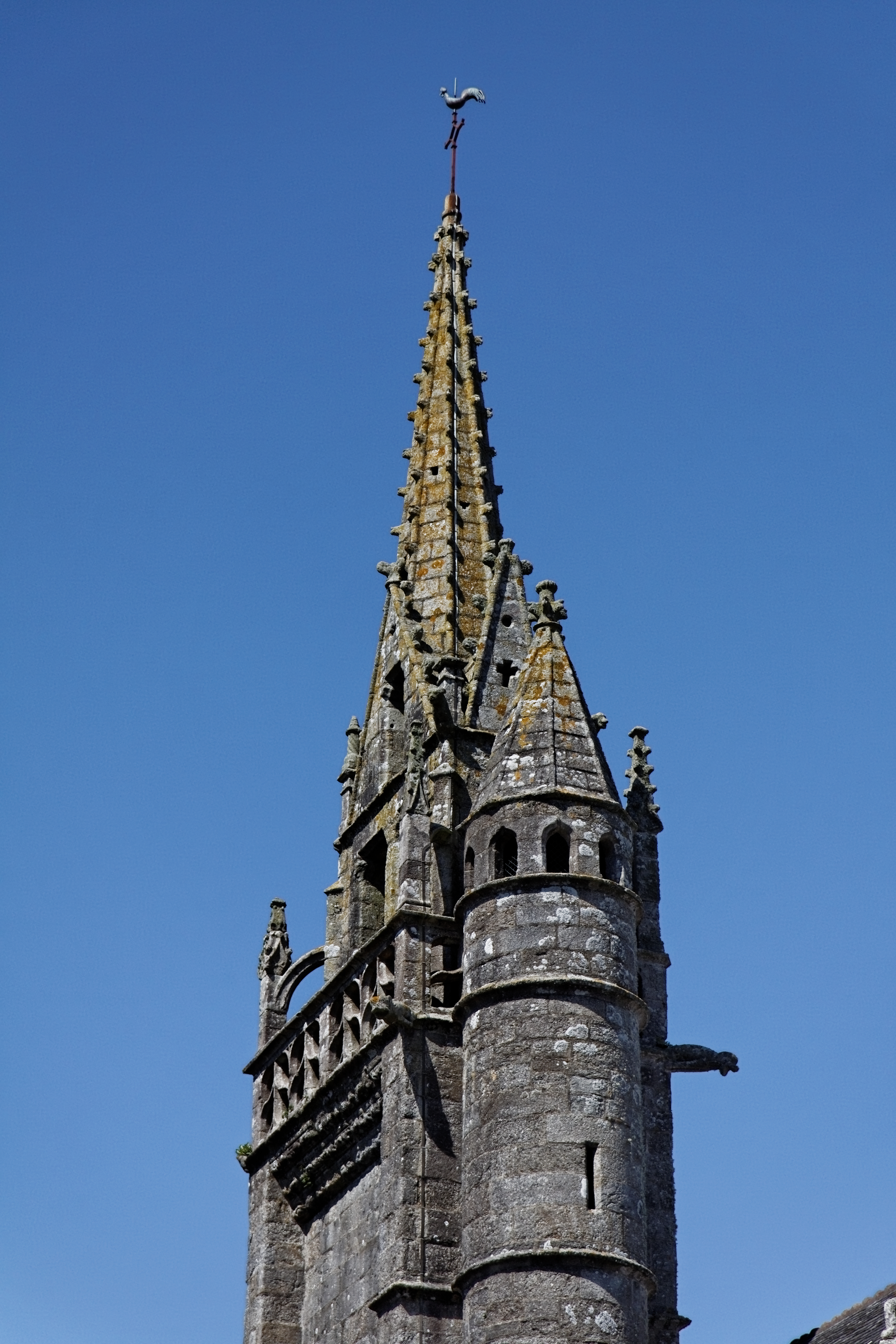 Vue de l'enclos paroissial de Guimiliau.